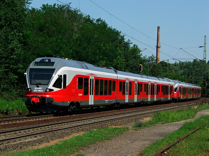 A MÁV Stadler gyártmányú, Flirt típusú motorvonata, Tata állomás és Tóvároskert megállóhely között, az 1-es számú fővonalon.